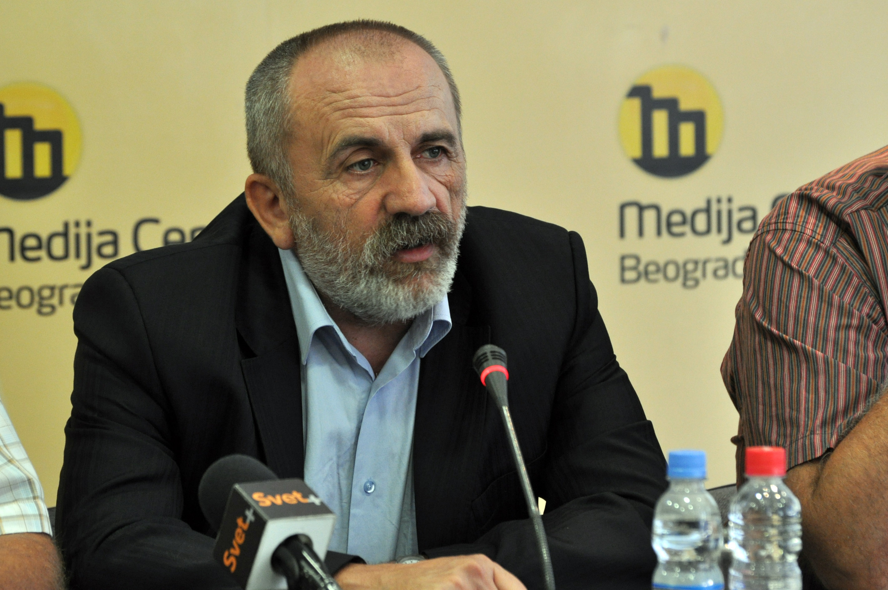 Фотографија политичара Маријана Ристичевића.